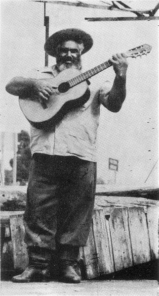 Fotografía del payador uruguayo Juan Carlos Bares "el indio", aparecida en la revista argentina "Rincón del Payador" nº4, en setiembre de 1980.